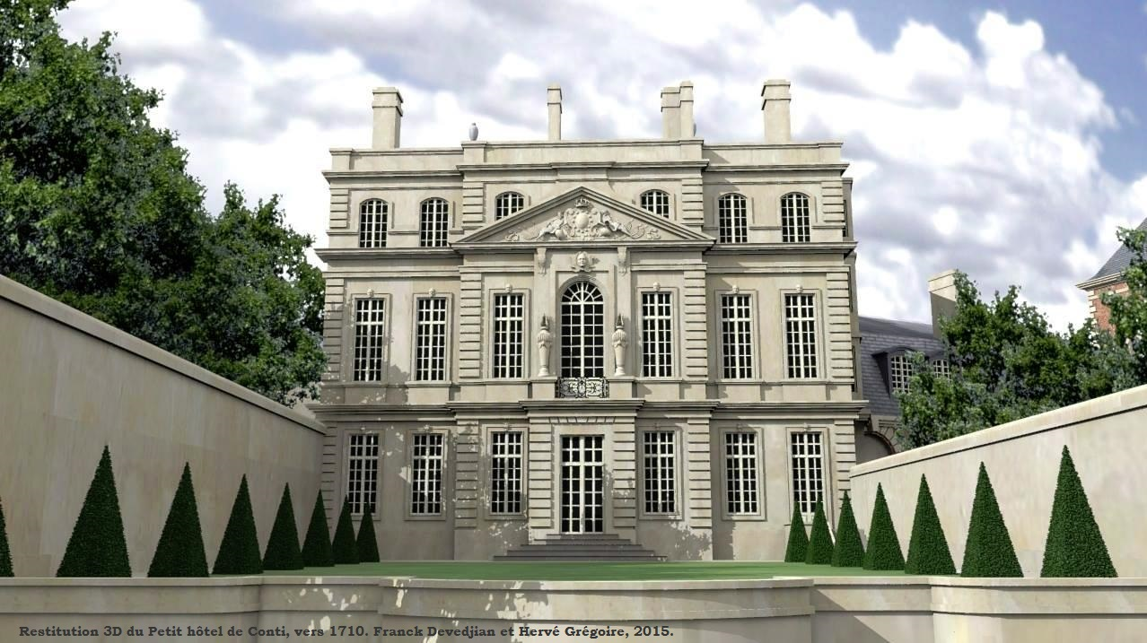 Restitution 3D de la façade sur jardin du Petit hôtel de Conti, vers 1710.